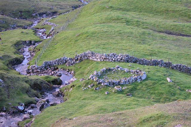 Old ruins in Víkarbyrgi